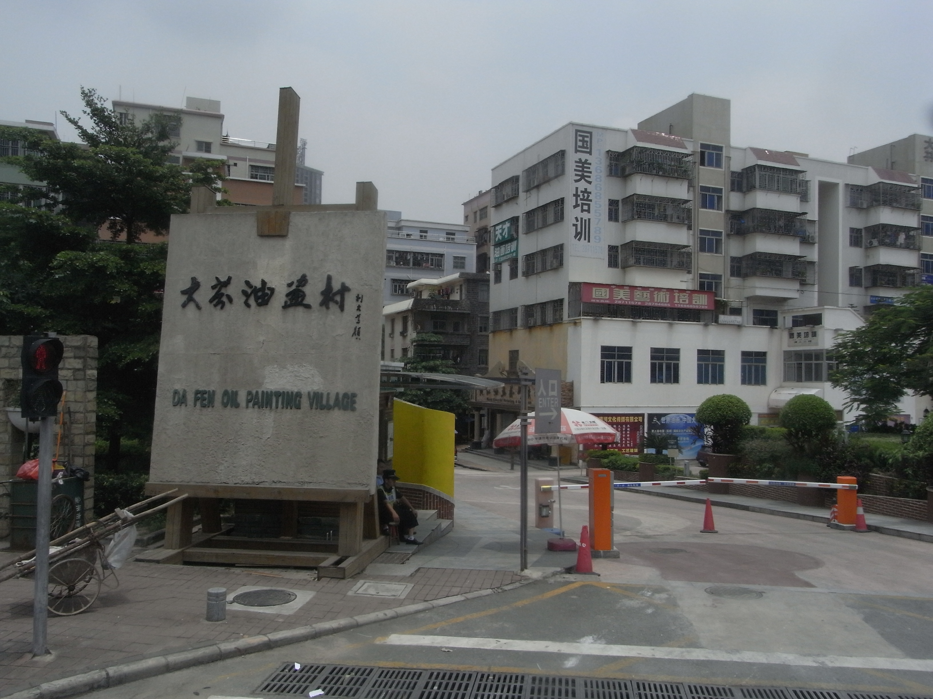 大芬村